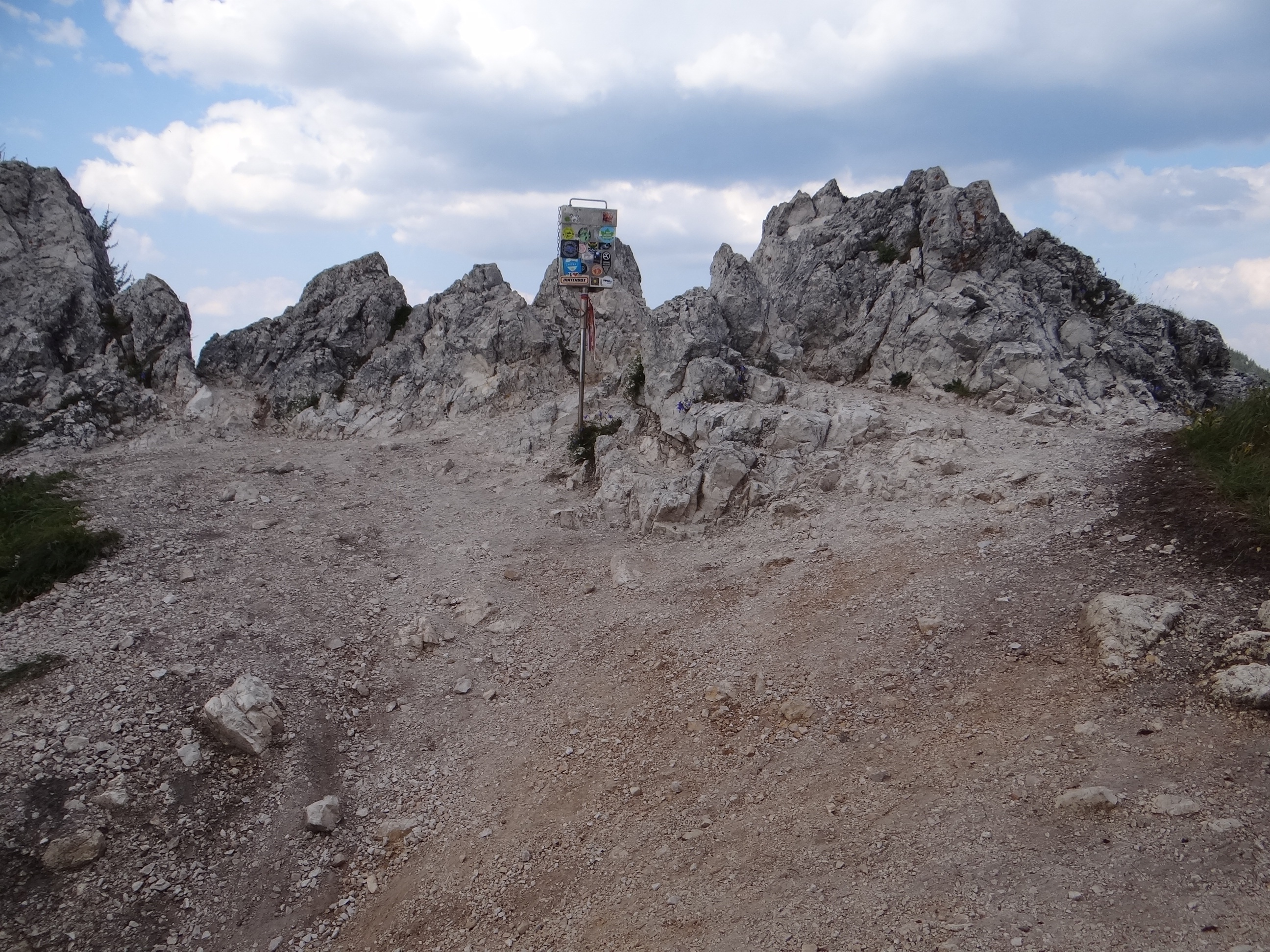 Ostrá (Veľká Fatra). Szczyt